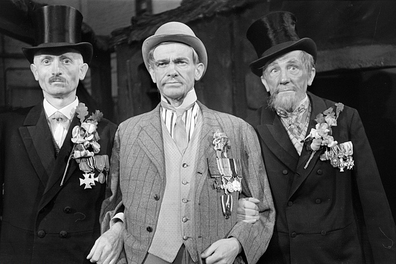 Original image description from the Deutsche Fotothek Szenenbilder